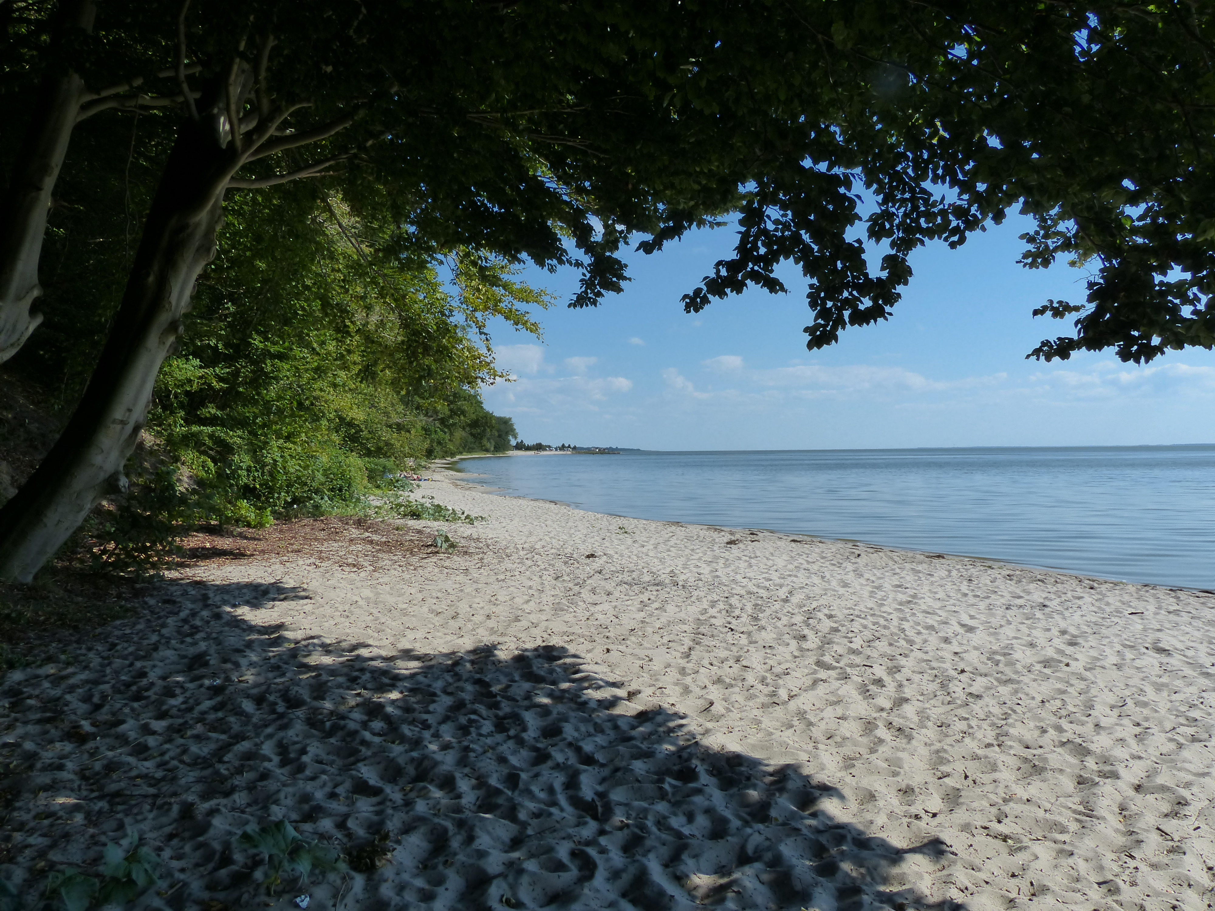 Kamminke, Strand am Stettiner Haff, Blick aus westlicher Richtung nach Kamminke